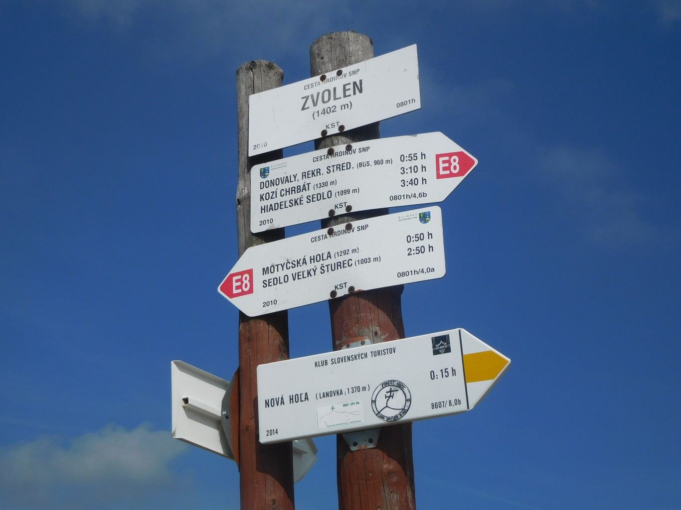 Vrcholový rázcestník